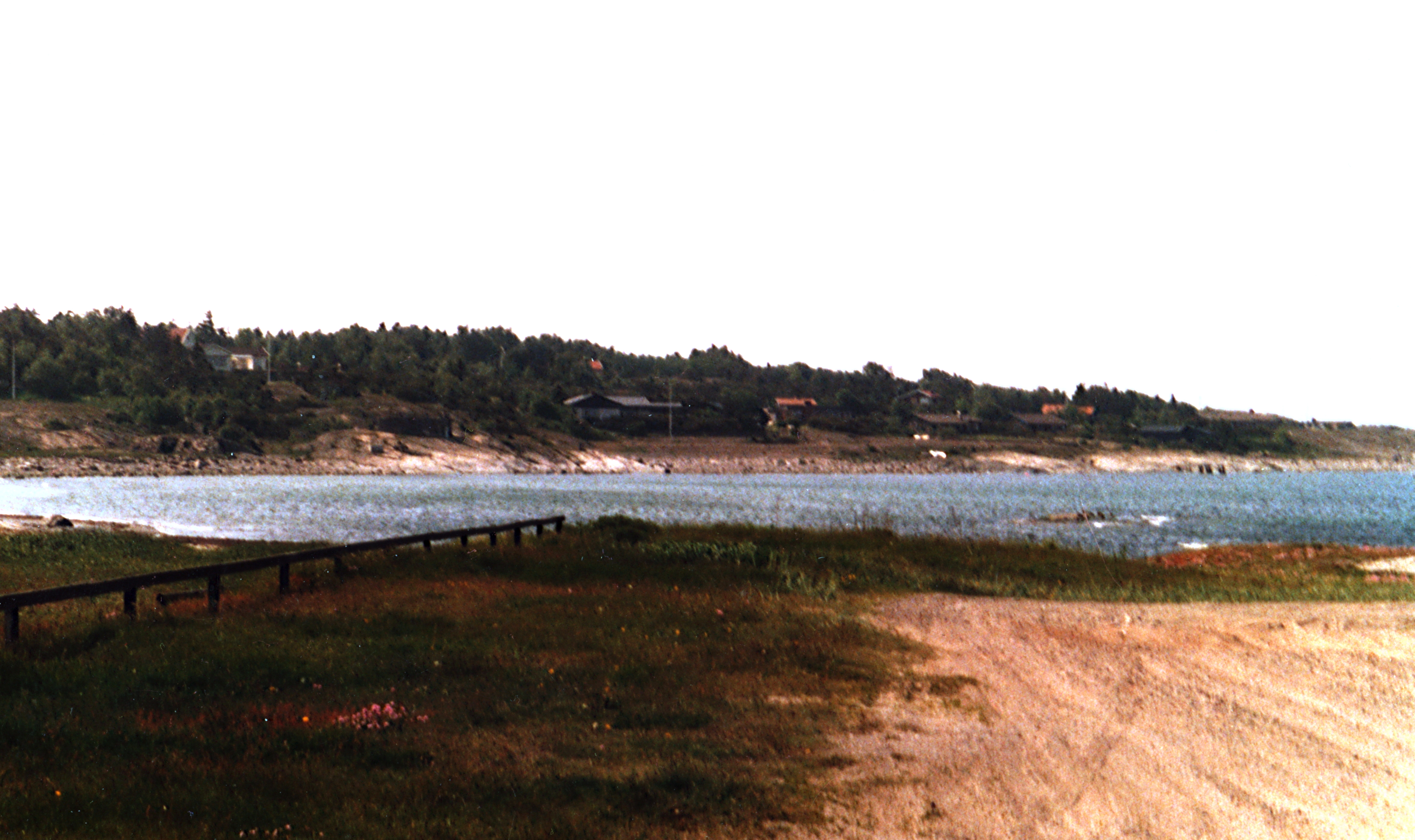 Askimsbadet (privata avd, ca 2001)